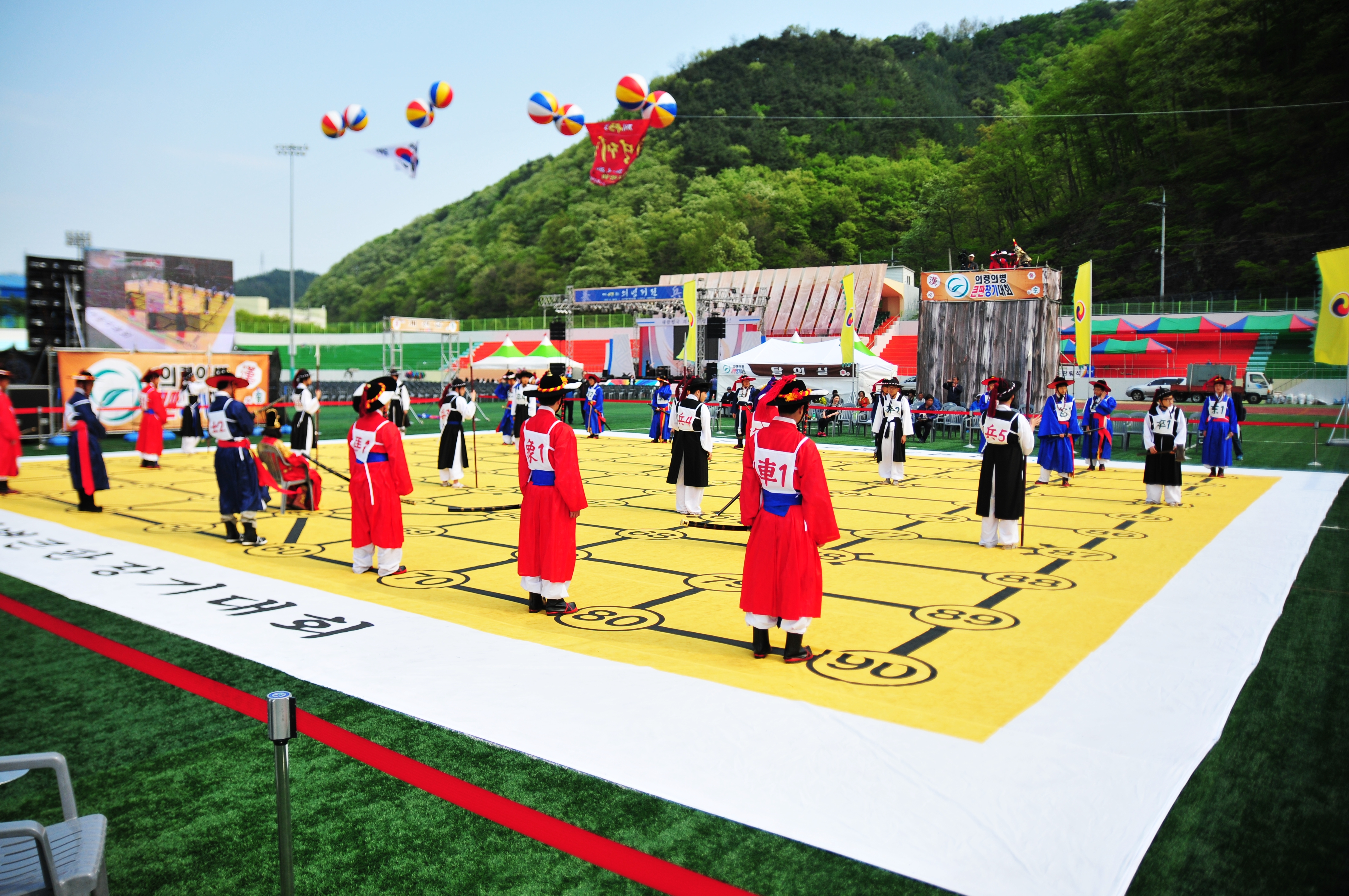 의병창의 423주년을 맞이하여 부활한 전통축제